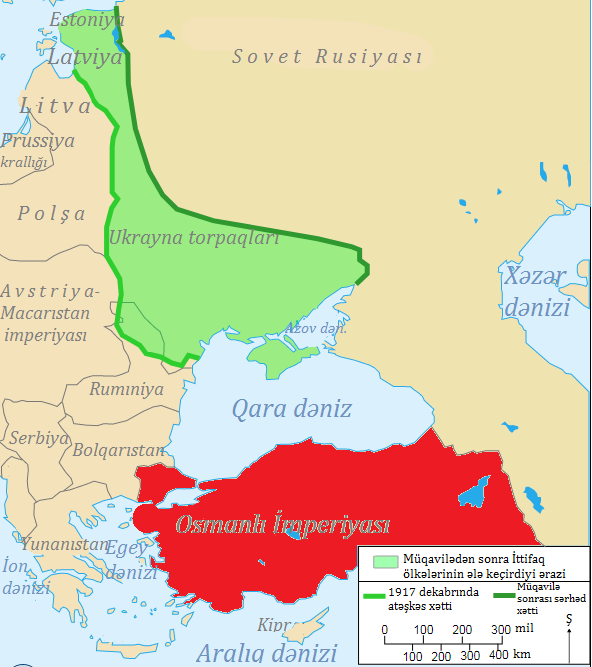 Sərhədlər və ərazi dəyişiklikləri